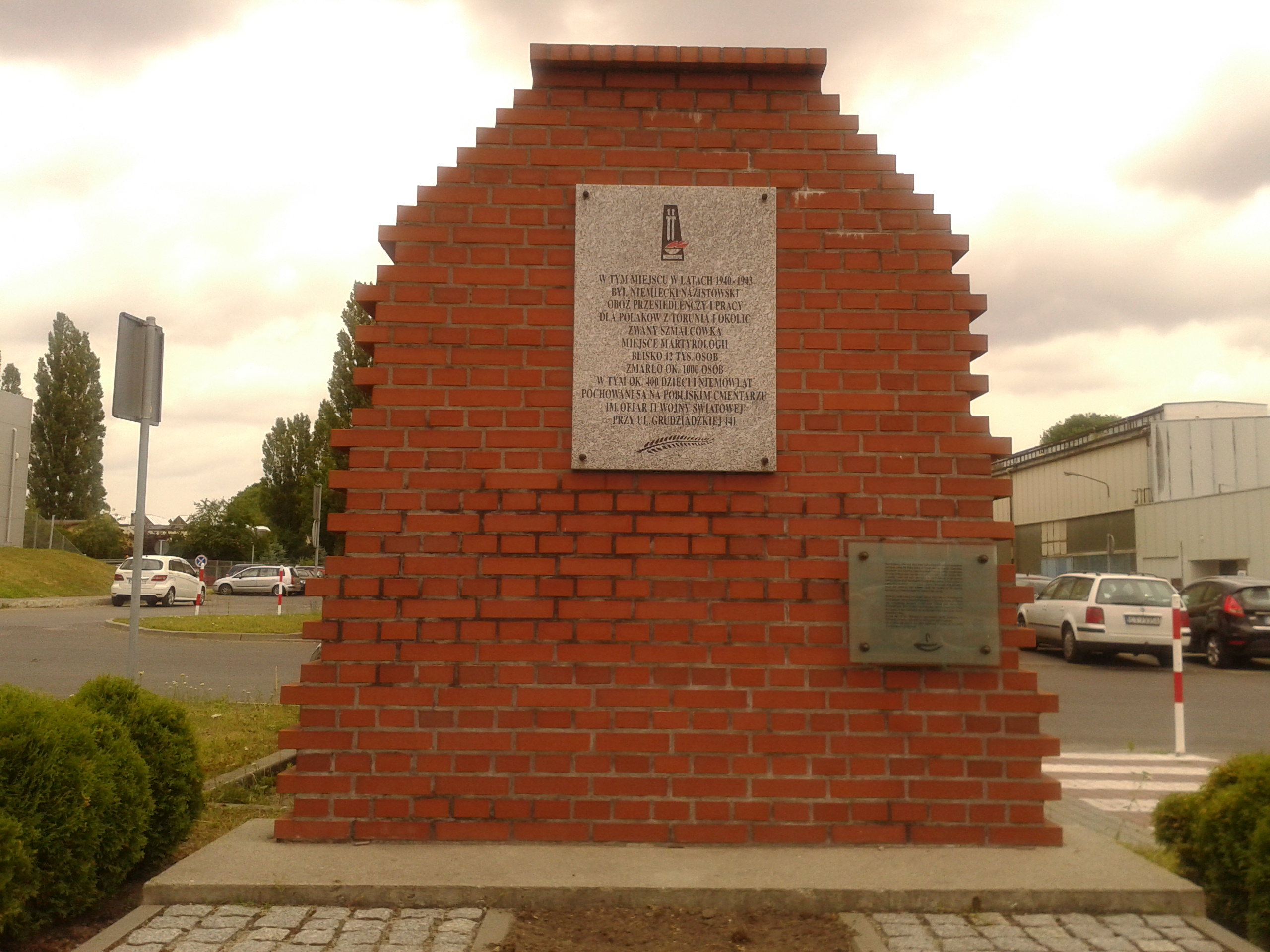 Pomnik w formie fragmentu ceglanego muru z tablicą upamiętniającą ofiary Szmalcówki nazistowskiego obozu dla Polaków z Torunia i okolic. Pomnik stoi przed parkingiem Urzędu Miasta Torunia znajdującego się pod adresem ulica Grudziądzka 126 b inskrypcja na górnej tablicy: W tym miejscu w latach 1940-1943/ Był niemiecki nazistowski/ Obóz przesiedleńczy i pracy/ Dla Polaków z Torunia i okolic/ Zwany szmalcówką/ Miejsce martyrologii/ Blisko 12 tysięcy osób/ Zmarło około 1000 osób/ W tym około 400 dzieci i niemowląt/ Pochowani są na pobliskim cmentarzu/ Imienia ofiar II wojny światowej/ Przy ulicy Grudziądzkiej 141